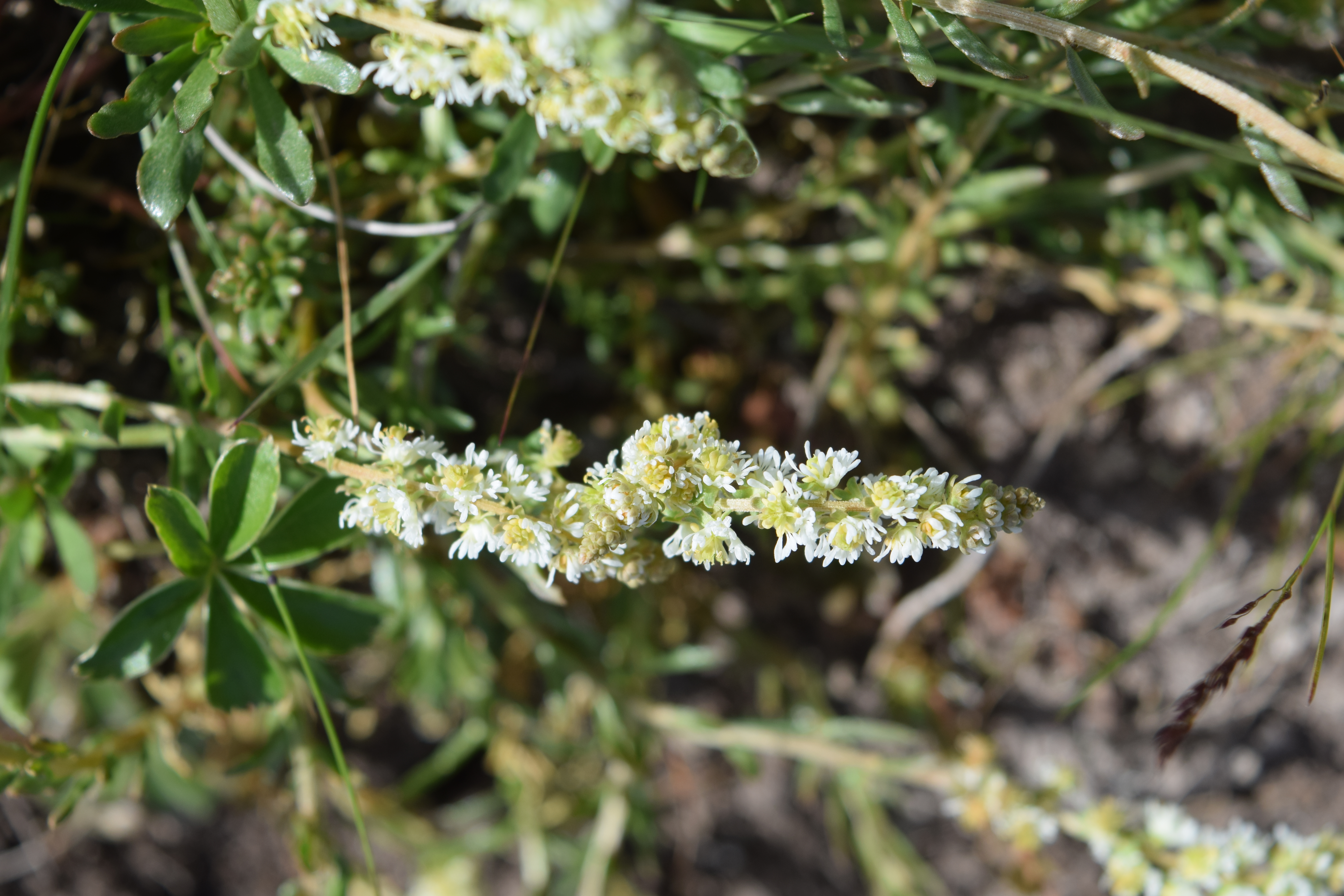 Sesamoides pygmaea, vandaag gefotografeerd in de Auvergne in Frankrijk.